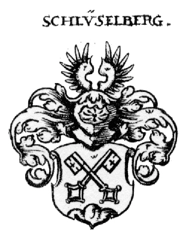 Wappen der Fränkischen Adelsfamilie Schlüsselberg